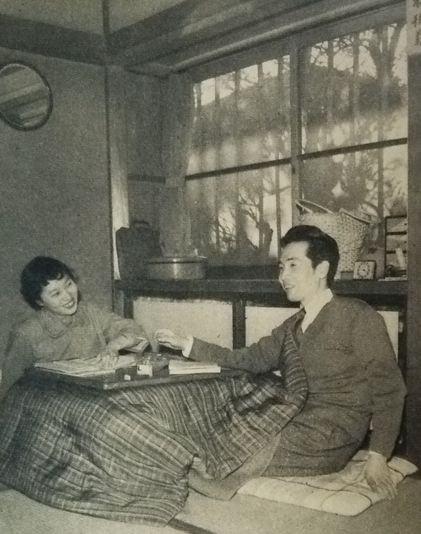 三浦朱門・曽野綾子夫妻